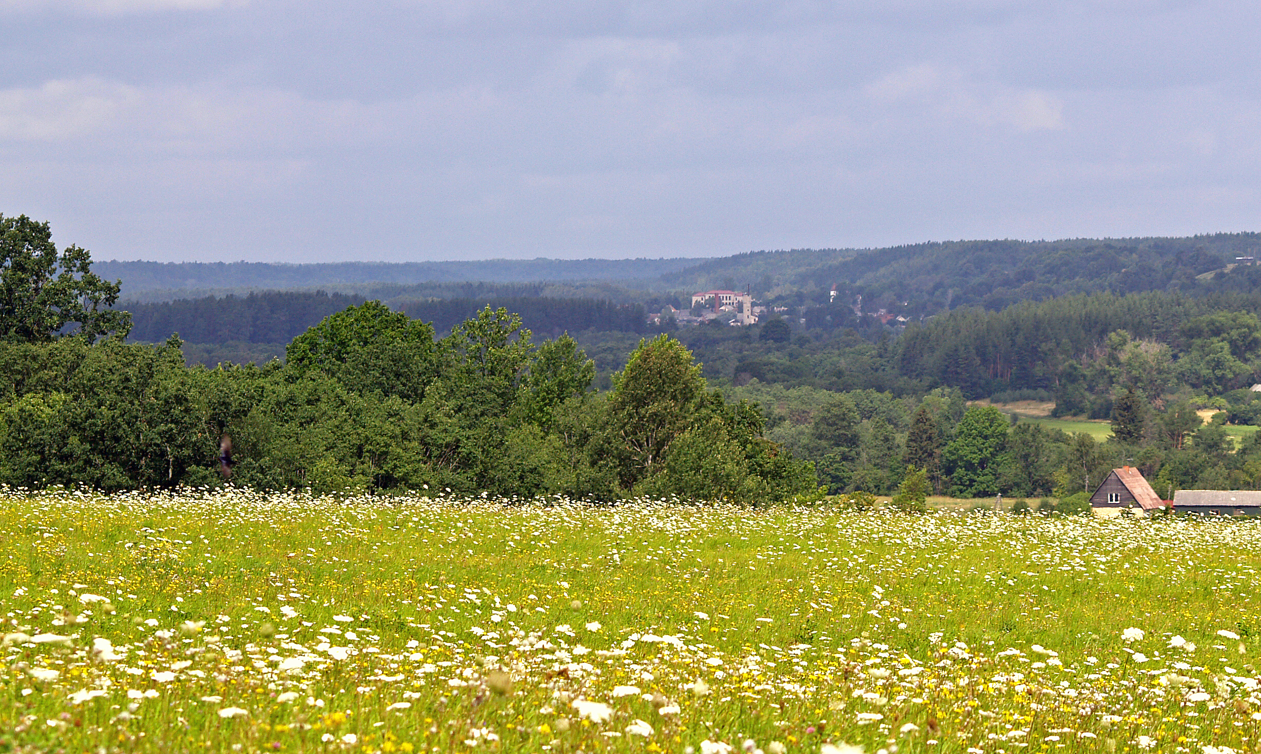 Matkules pagastā (near Matkule)